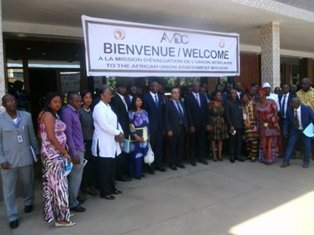 Abdoulaye Magassouba reçoit une mission d’évaluation d'experts de l'Union Africaine dans le cadre de la sélection du siège du Centre africain de développement minier (CADM) en Mars 2016.